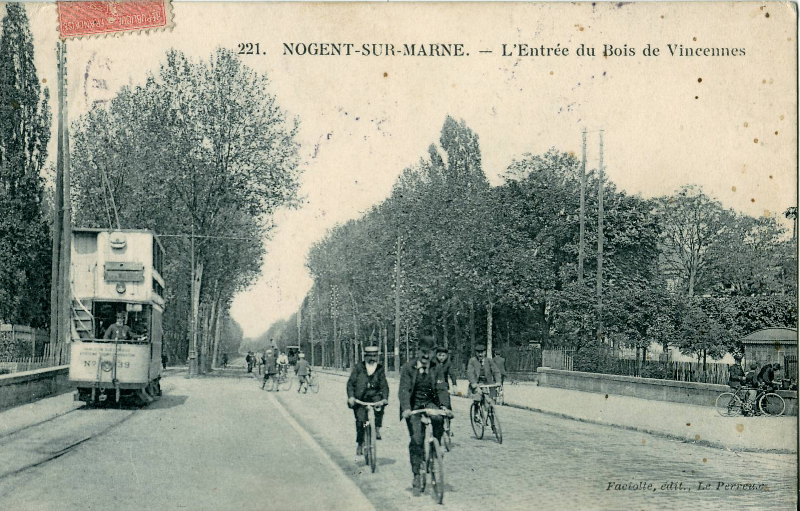 Carte postale ancienne éditée par Faciolle au Perreux, N°221Nogent-sur-Marne : L'Entrée du Bois de VincennesMotrice électrique à impériale de la ligne 1 des Chemins de fer nogentais, une compagnie de tramway de l'est Parisien